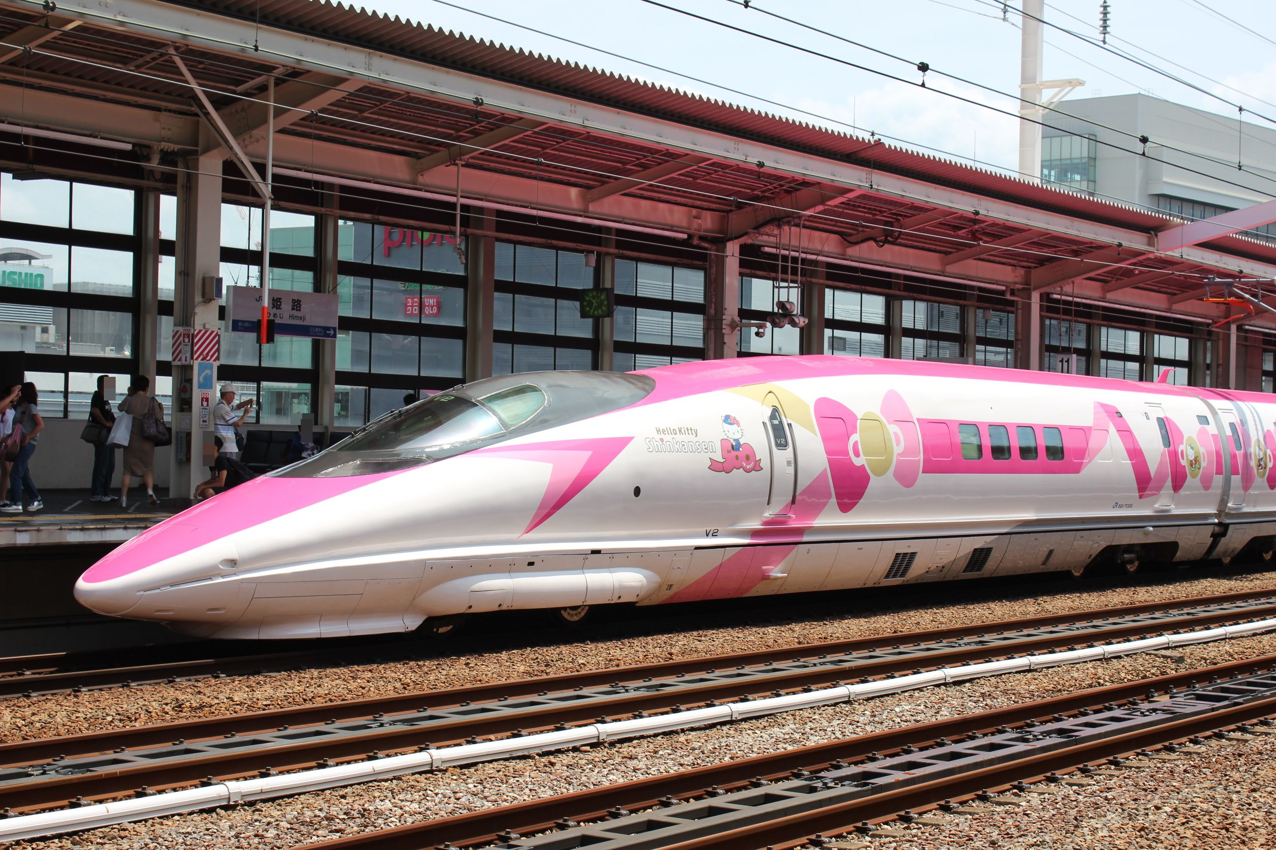 新幹線500系電車 Ｖ２編成 JR西日本「ハローキティ新幹線」塗装 姫路駅で撮影 Canon EOS Kiss X5